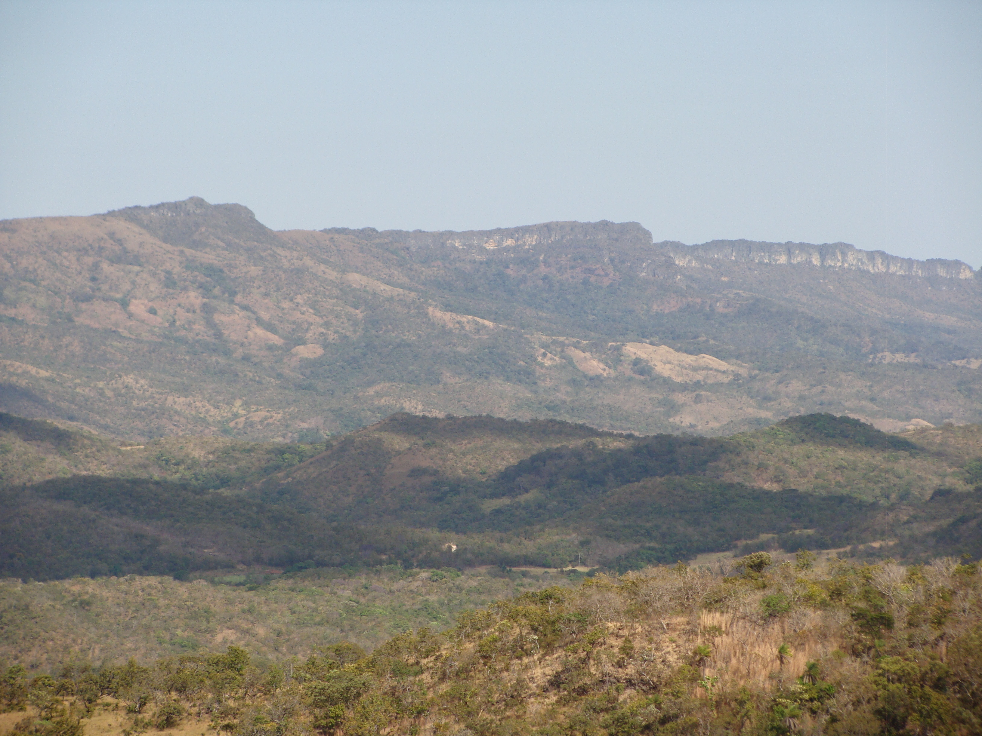 Vista dos paredões da Serra nas proximidades da Cidade de Goiás no Ponto do Mirante.